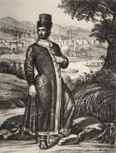 Русская одежда в XIV до XVIII столетия, терлик и шапка мурмолка. (Вид изображает Город Астрахань в начале XVII столетия).